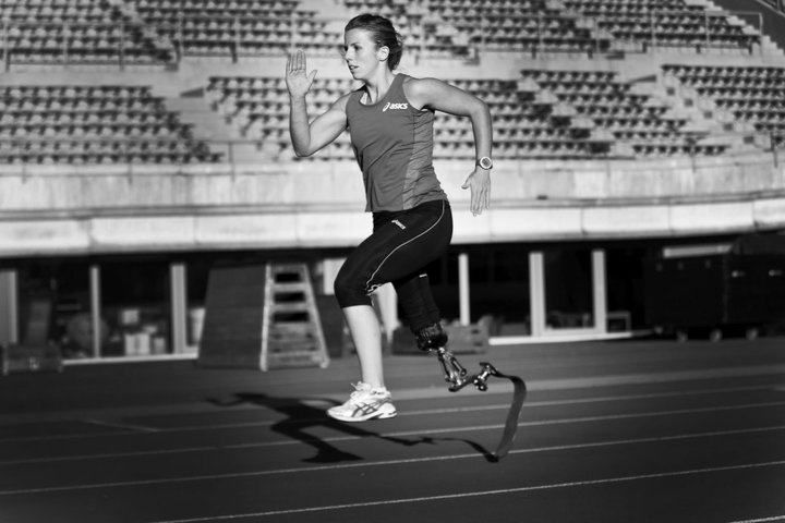 Marije Smits - tijdens training in Amsterdam